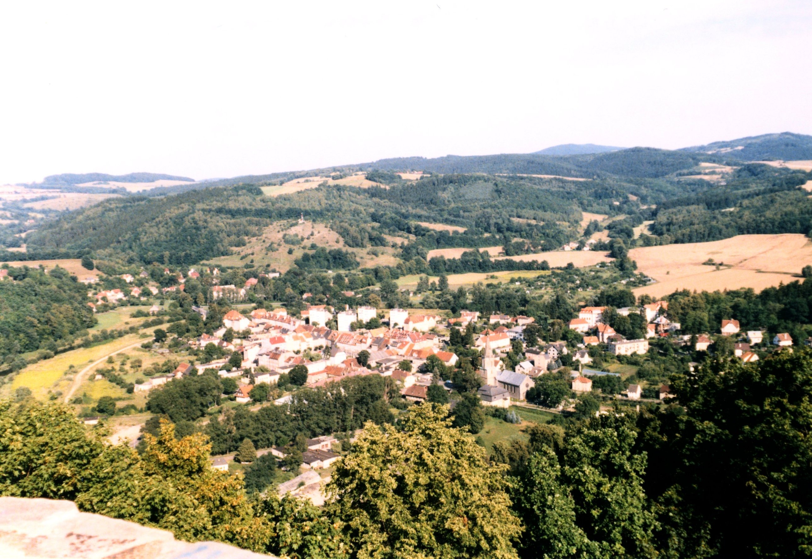 Wleń - widok z wieży zamkowej